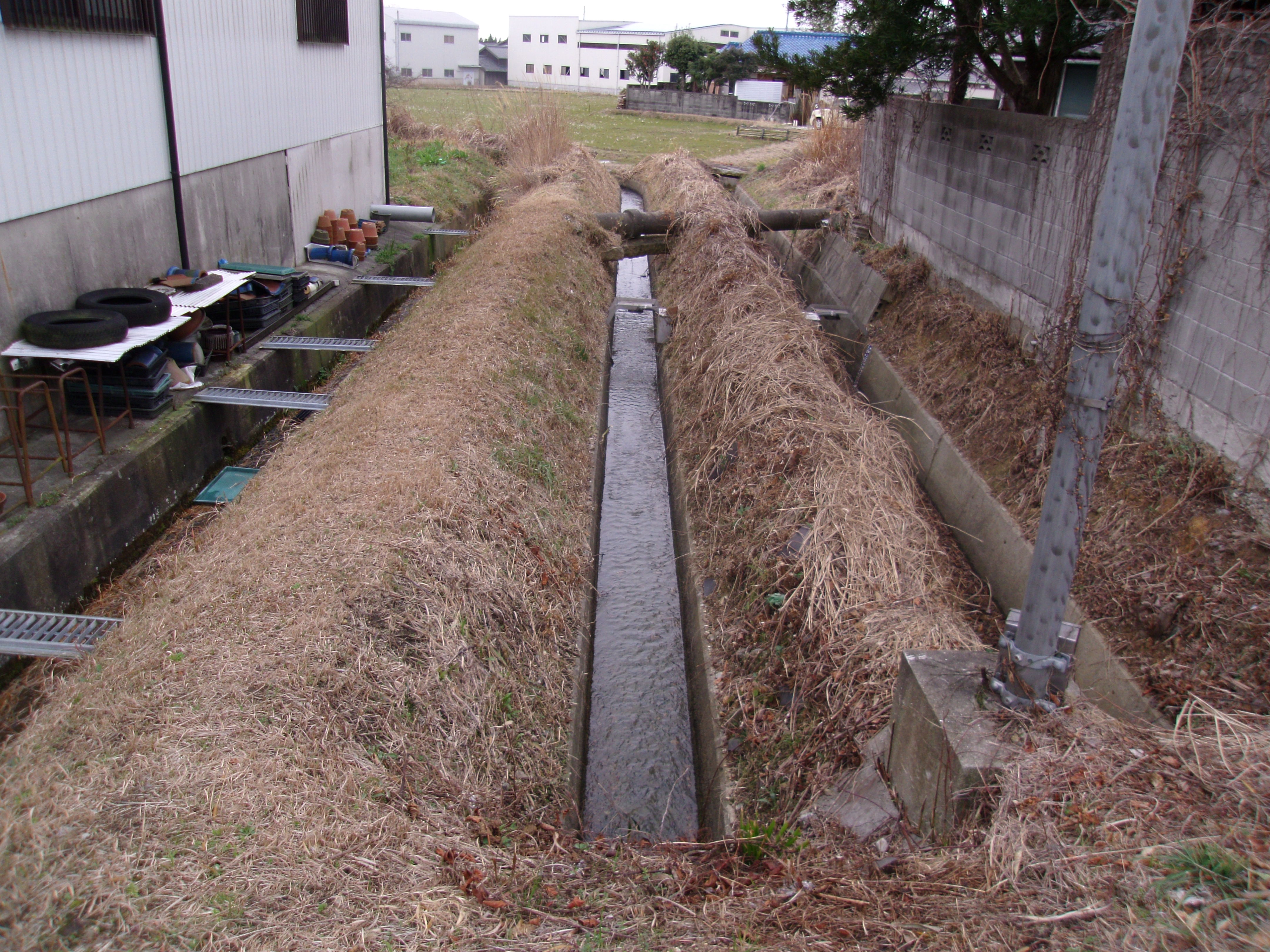 淡河疎水－練部屋分水から分岐した蛸草(左)・天満(中)・草谷(右)の各支線が併行する